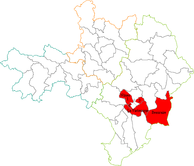 Première circonscription législative du département du Gard